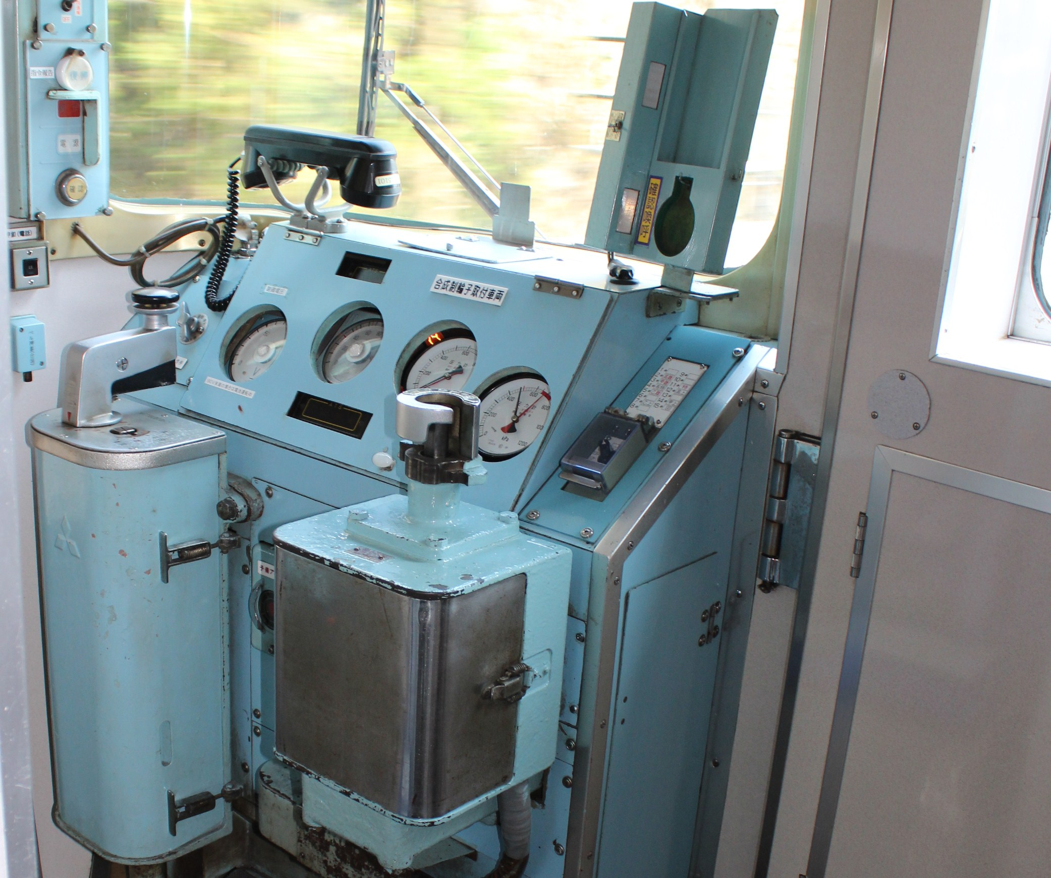 15200系運転台。